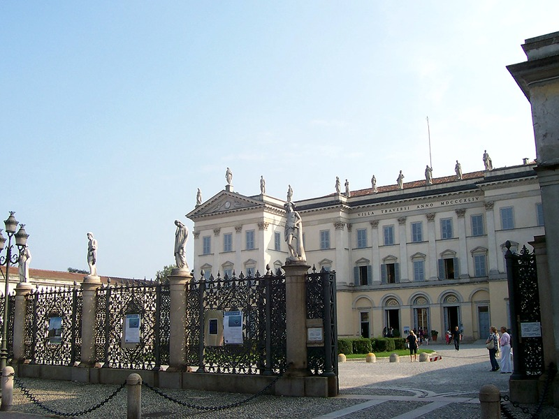 Desio - Villa Tittoni Traversi